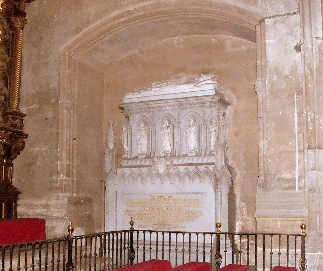 Sepulcro del cardenal Francisco Javier Cienfuegos Jovellanos (1766-1847) en la capilla de la Concepción Grande de la catedral de Sevilla, (España). Este prelado llegó a ser arzobispo de Sevilla, obispo de Cádiz y rector de la Universidad de Sevilla.